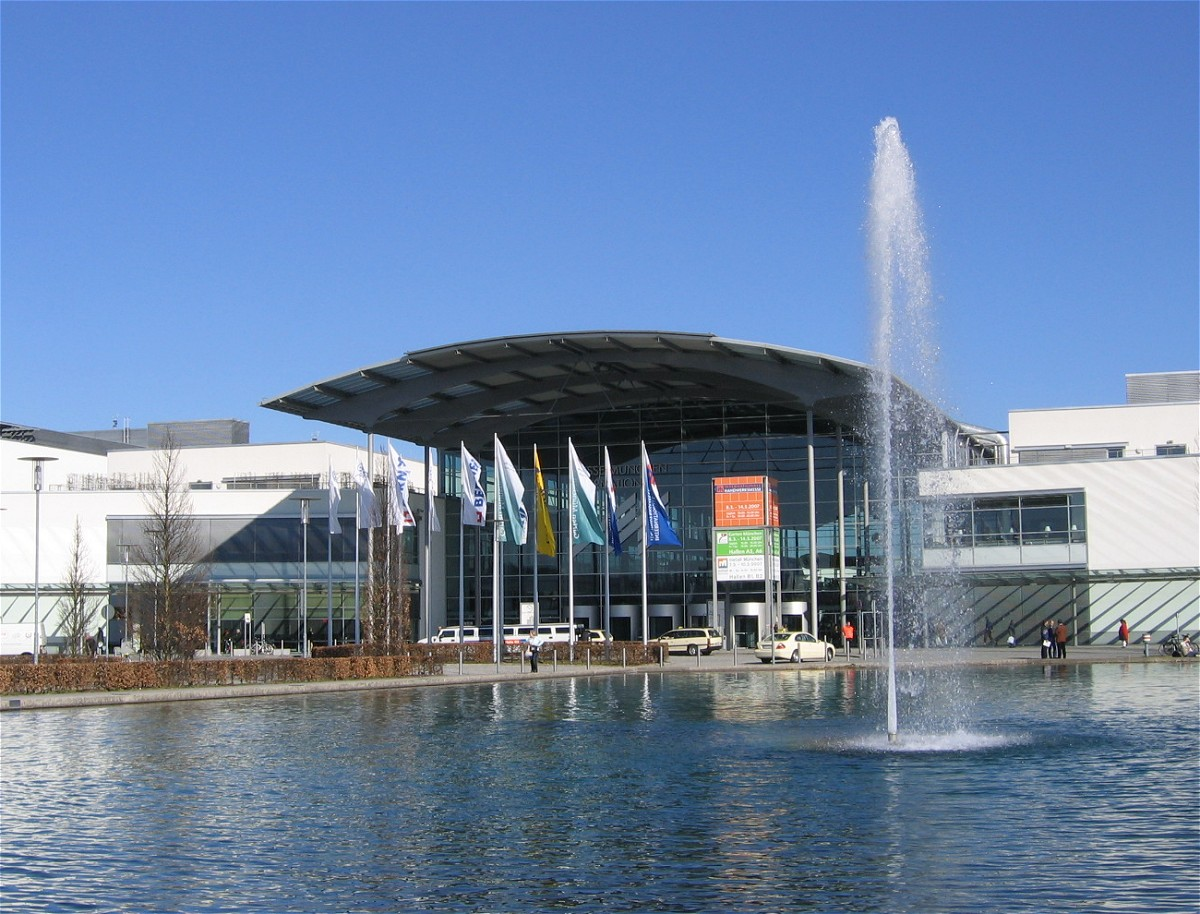 Messe West-Eingang, München